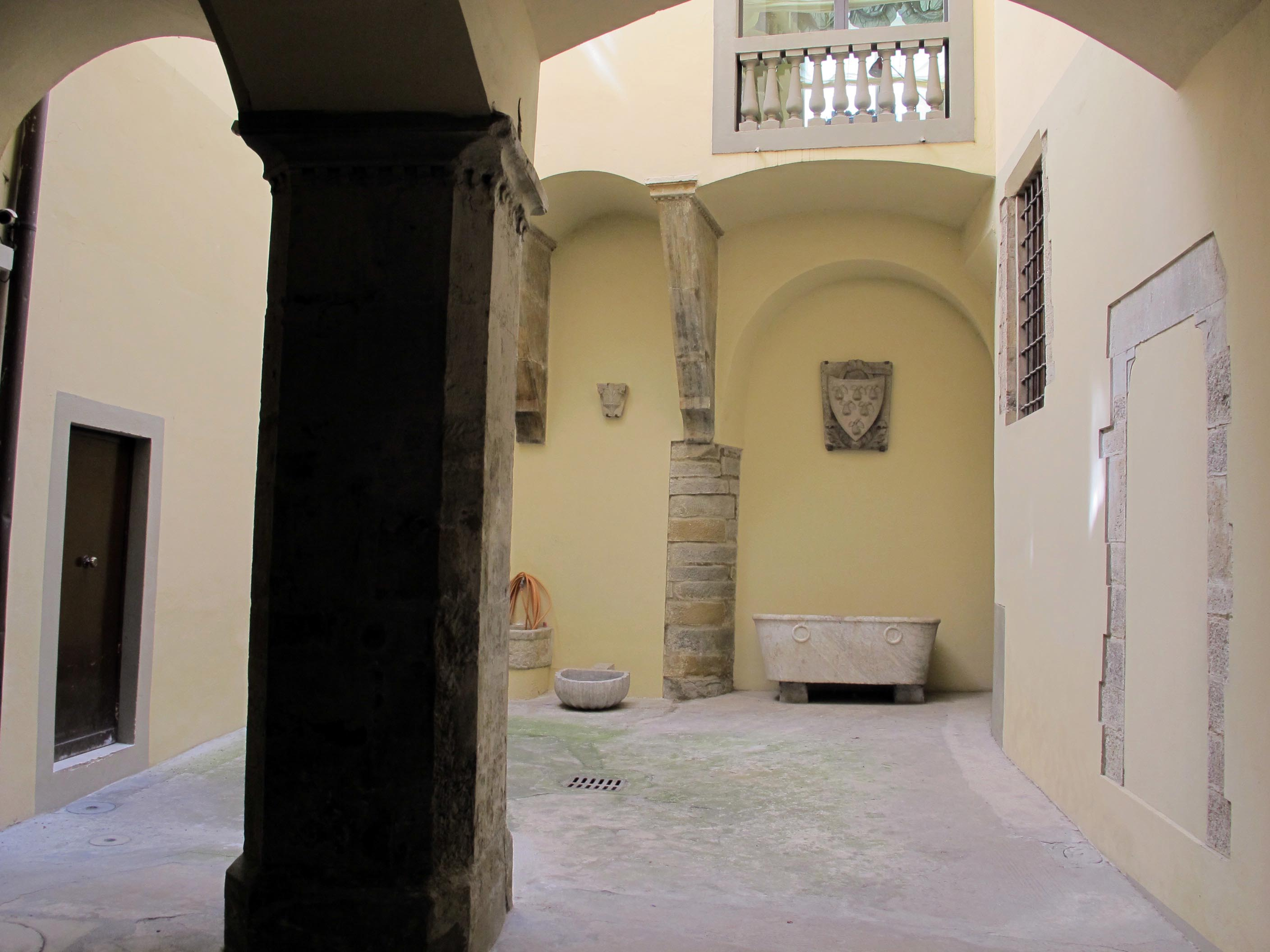 Palazzo di ubaldino peruzzi, fi, cortiletto